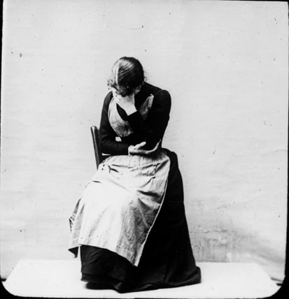 Fonds Trutat - Photographie ancienne Cote : TRU C 1327 Localisation : Fonds ancien (S 30) Original non communicable Titre : Catalepsie, bruit de cloche, tristesse Auteur : Londe, Albert [?] Rôle de l’auteur : Photographe Lieu de création : Non identifié Date de création : 1859-1910 [entre] Mesures : : 12 x 9 cm Observations : Notes manuscrites sur la plaque : "catalepsie, bruit de cloche, tristesse" Cette plaque serait une reproduction d'une plaque d'Albert Londe, pionnier de la photographie médicale à la Salpétrière à Paris, et ferait partie de la collection de plaques de projection de Trutat destinées à ses cours Mot(s)-clé(s) : -- Femme -- Costume féminin -- Chaise -- Tristesse -- Pleurant -- Assis -- Catalepsie -- Non identifié -- 19e siècle, 2e moitié -- 20e siècle, 1e quart Médium : Photographies -- Négatifs sur plaque de verre -- Noir et blanc -- Portraits Bibliothèque de Toulouse. Domaine public